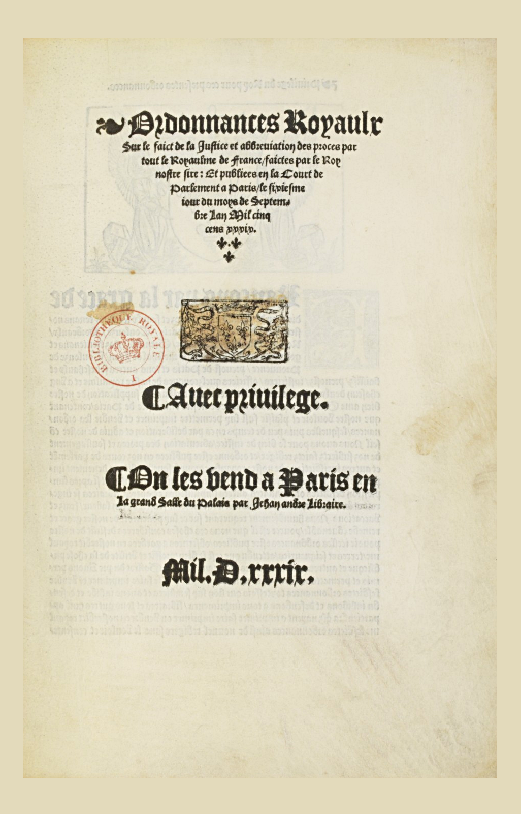 Ordonnances royaulx sur le faict de la justice et abbreviation des procès par tout le royaulme de France (page de titre), Texte imprimé de l'ordonnance promulguée le 1er août 1539 à Villers-Cotterets, Bibliothèque nationale de France, Réserve des livres rares, Paris